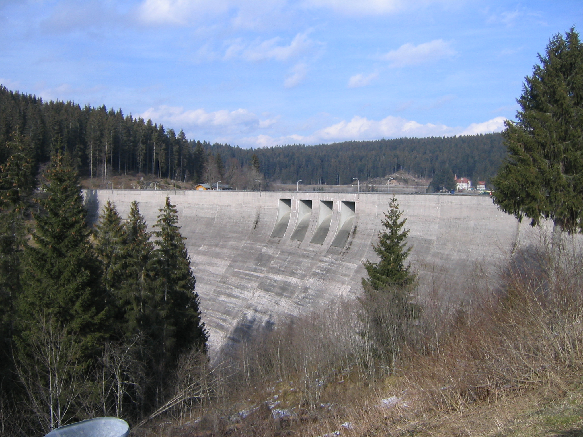 Staumauer des Schluchsees